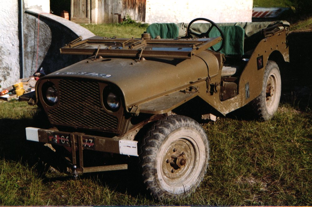 Ma VLR Delahaye devant la grange